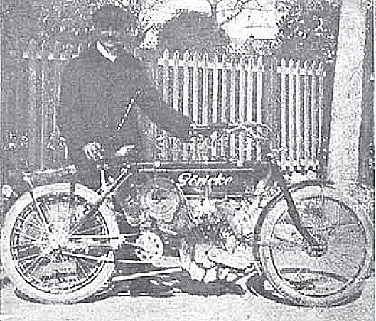 F. Cepeda, campeón de España de Motociclismo con su motocicleta Göricke (1908)